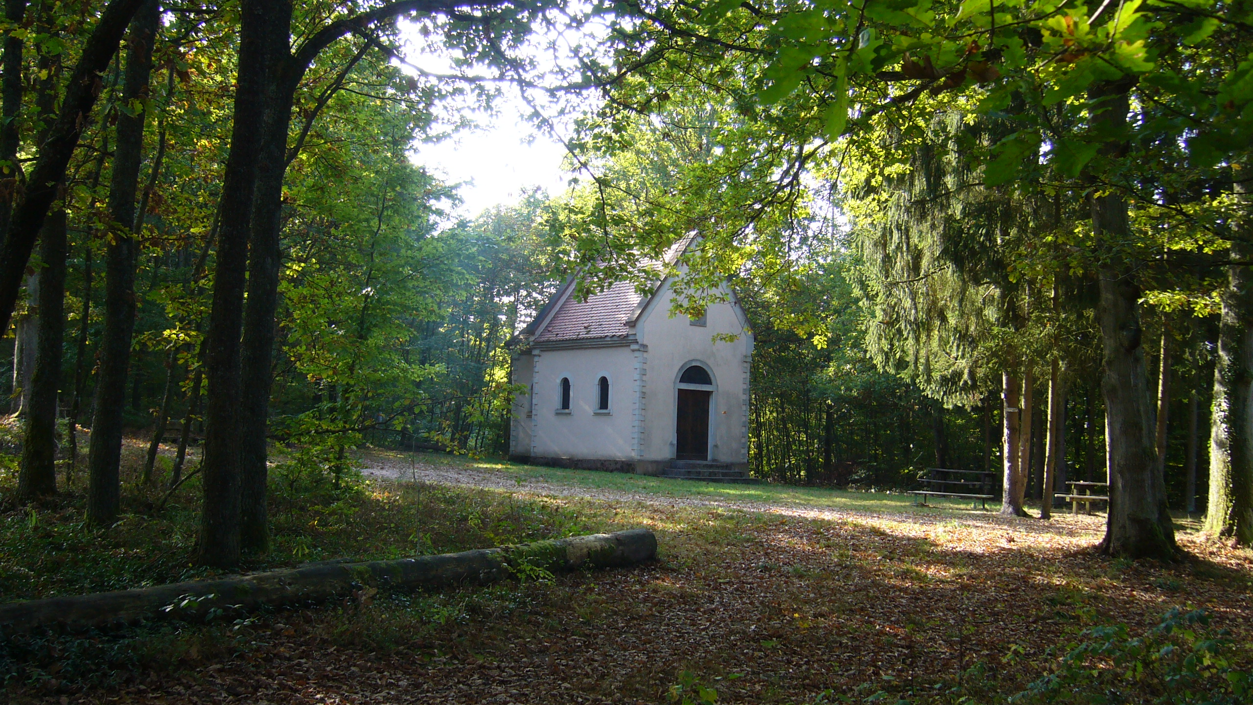 Chapelle de l'Aigle située dans la forêt communale de Kintzheim